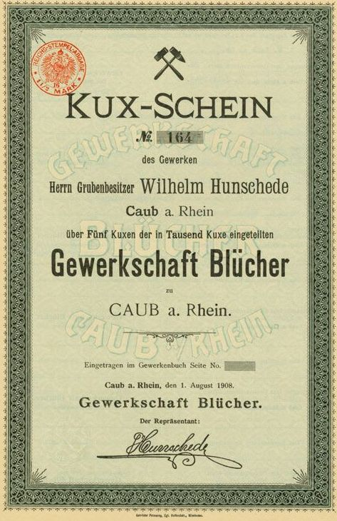 Kux-Schein der Gewerkschaft Blücher aus Kaub, Rheinland-Pfalz. Ausgabedatum 1. August 1908. Die Gewerkschaft war Betreiberin der Grube Kreuzberg bei Weisel.